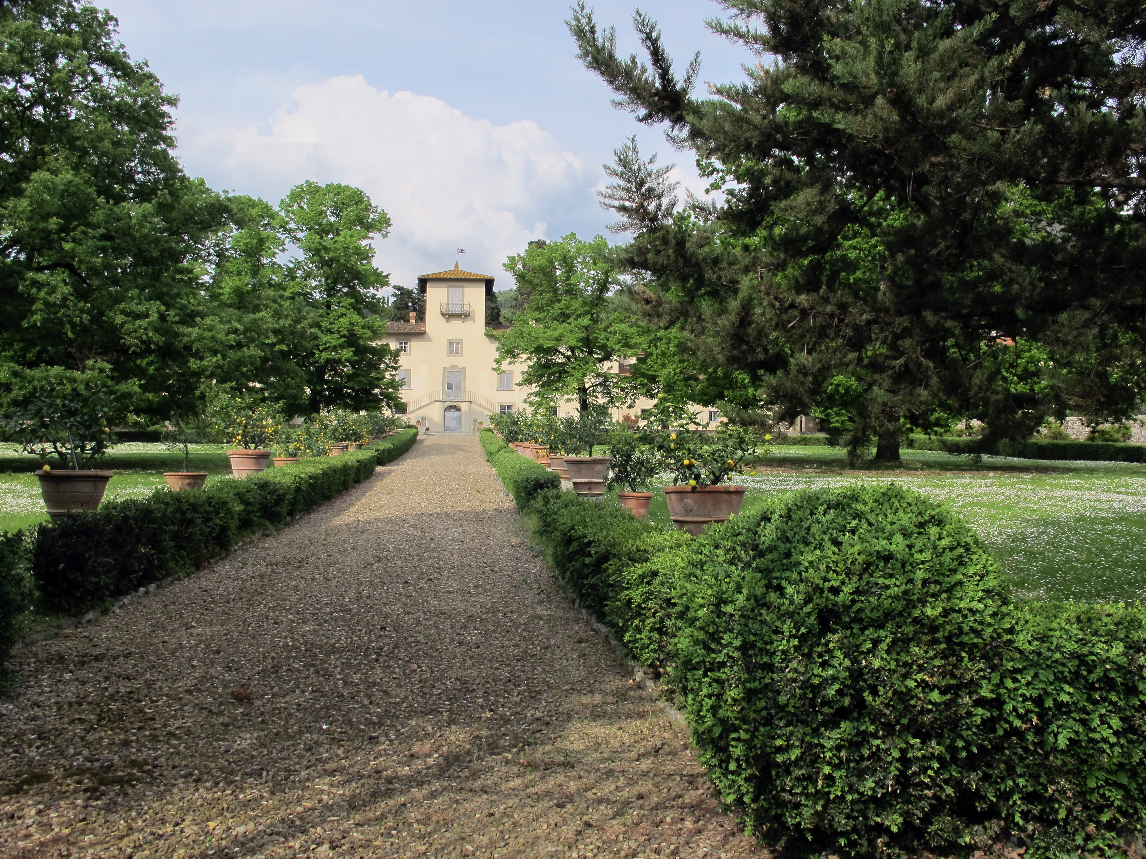 Montemurlo